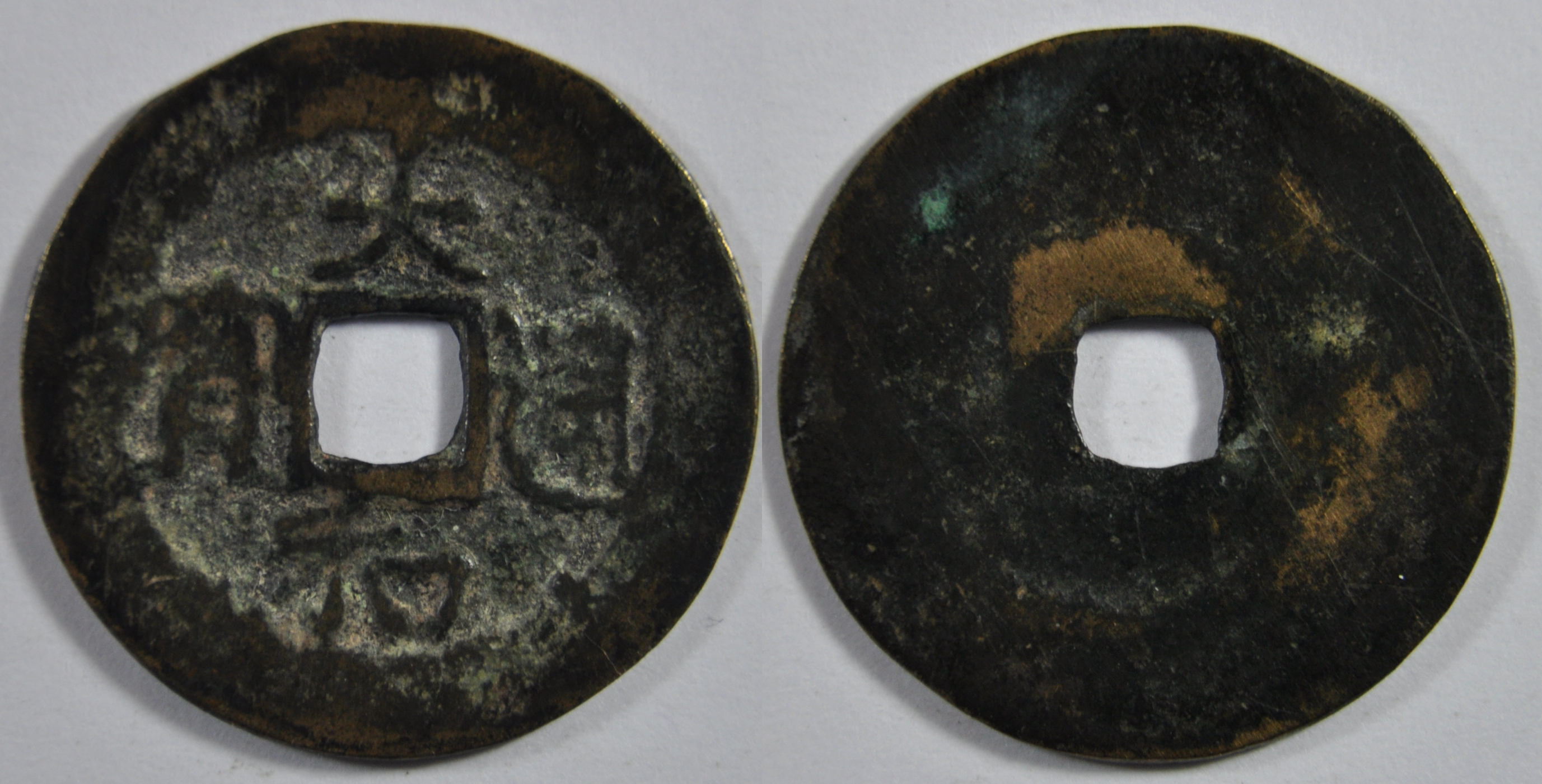 Une monnaie en cuivre d'une sapèque de l'empereur Le Nhan Tong (1442-1459), ère Dai Hoa (1443-1453) de la dynastie des Le postérieurs (Nha Hau Le) qui a dirigé le Vietnam de 1428 à 1788. A l'époque, le pays s'appelait le Dai Viet. A/ Dai Hoa thong bao (Monnaie courante de l'ère Dai Hoa) R/ vide Dimension : 21,75 mm Poids : 1,4 g. Remarques : Il s'agit d'une fonte privée d'époque. Les souverains vietnamiens n'ont jamais pu empêcher le monnayage privé car le monnayage officiel n'était pas suffisant. La monnaie est petite et peu lourde : ces monnaies valaient moins que les pièces officielles. Références : 417 BNF (Catalogue des monnaies vietnamiennes, François Thierry, 1988), Mitchiner NIS 4474 Indice de rareté : TC (Très Commune)